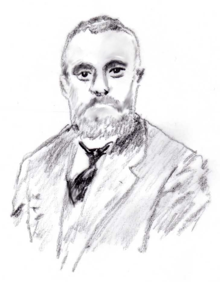 Retrat fet a llapis de Joaquim Sarret i Arbós